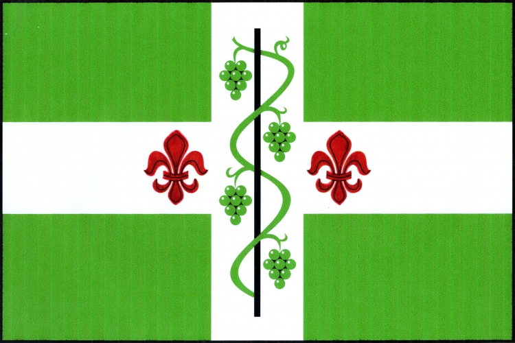 vlajka, Dolenice, okres Znojmo